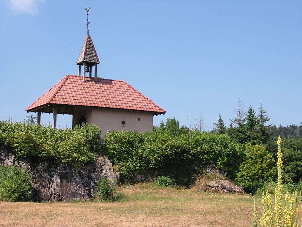 La chapelle du Saint-Mont Située sur le lieu de retraite de saint Romaric Commune de Saint-Amé (Vosges) La chapelle, telle qu'elle fut construite au XIXe siècle, avait déjà été restaurée en 1953 à l'occasion du 13e centenaire de la mort de Saint Romary. Photo personnelle du 15 juillet 2006. Copyright © Christian Amet